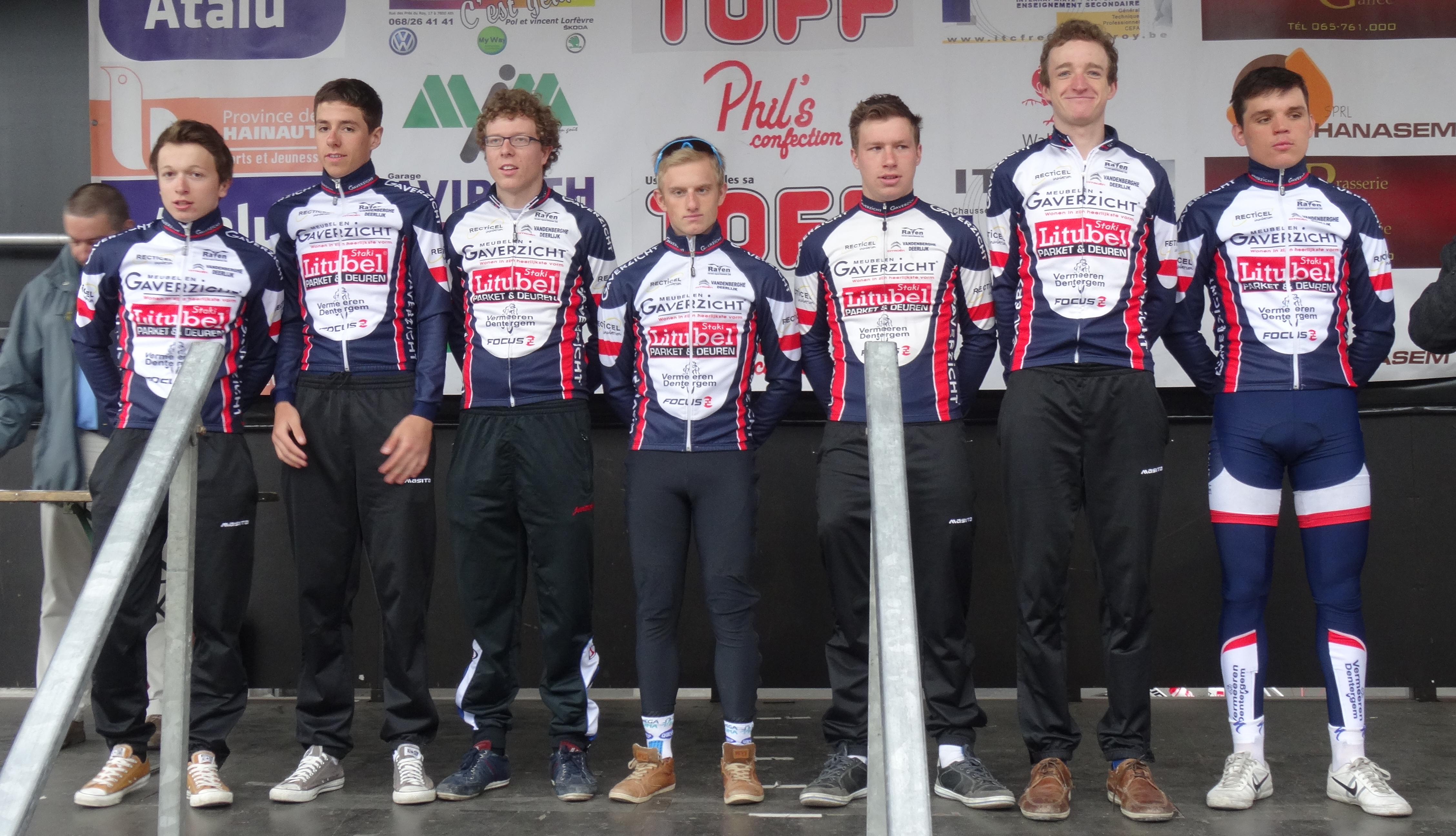 Triptyque des Monts et Châteaux 2014, étape 1, 4 avril 2014, départ d'Antoing. no fallback page found for autotranslate (base=By courtesy of Triptyque des Monts et Châteaux 2014, lang=en) Depicted team: KSV Deerlijk-Gaverzicht no fallback page found for autotranslate (base=By courtesy of Triptyque des Monts et Châteaux 2014, lang=en)